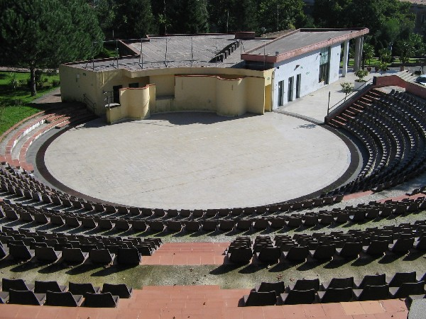 Anfiteatro Comunale "Falcone e Borsellino" - Zafferana Etnea (CT) - Foto D. Pennisi